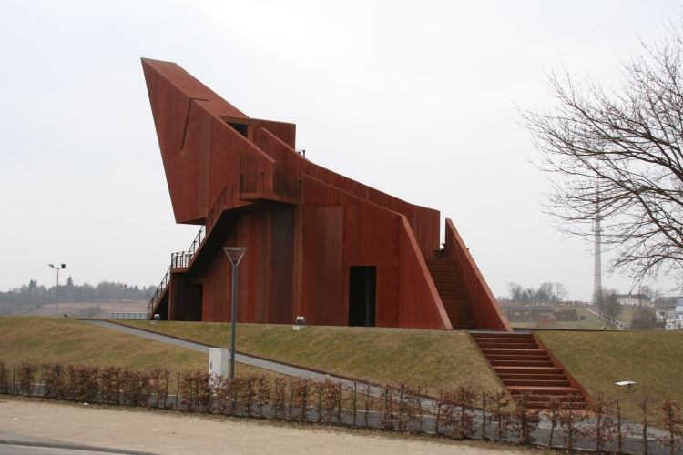 Lëtzebuerger Tuerm zu Tréier (Mäerz 2006)